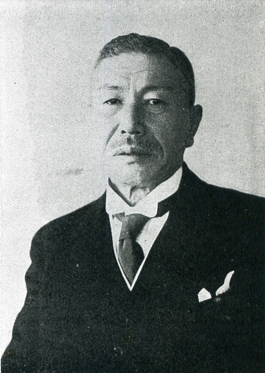 この写真は、木下成太郎（1865-1942）の写真です。